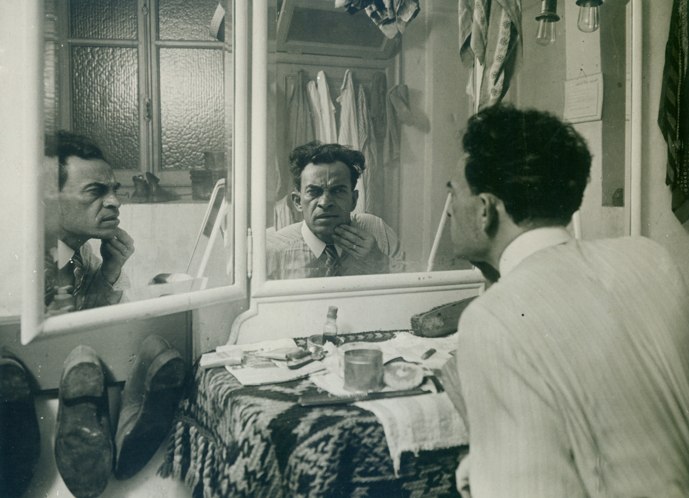 Foto di mia proprietà di Raffaele Viviani nel camerino nel 1933